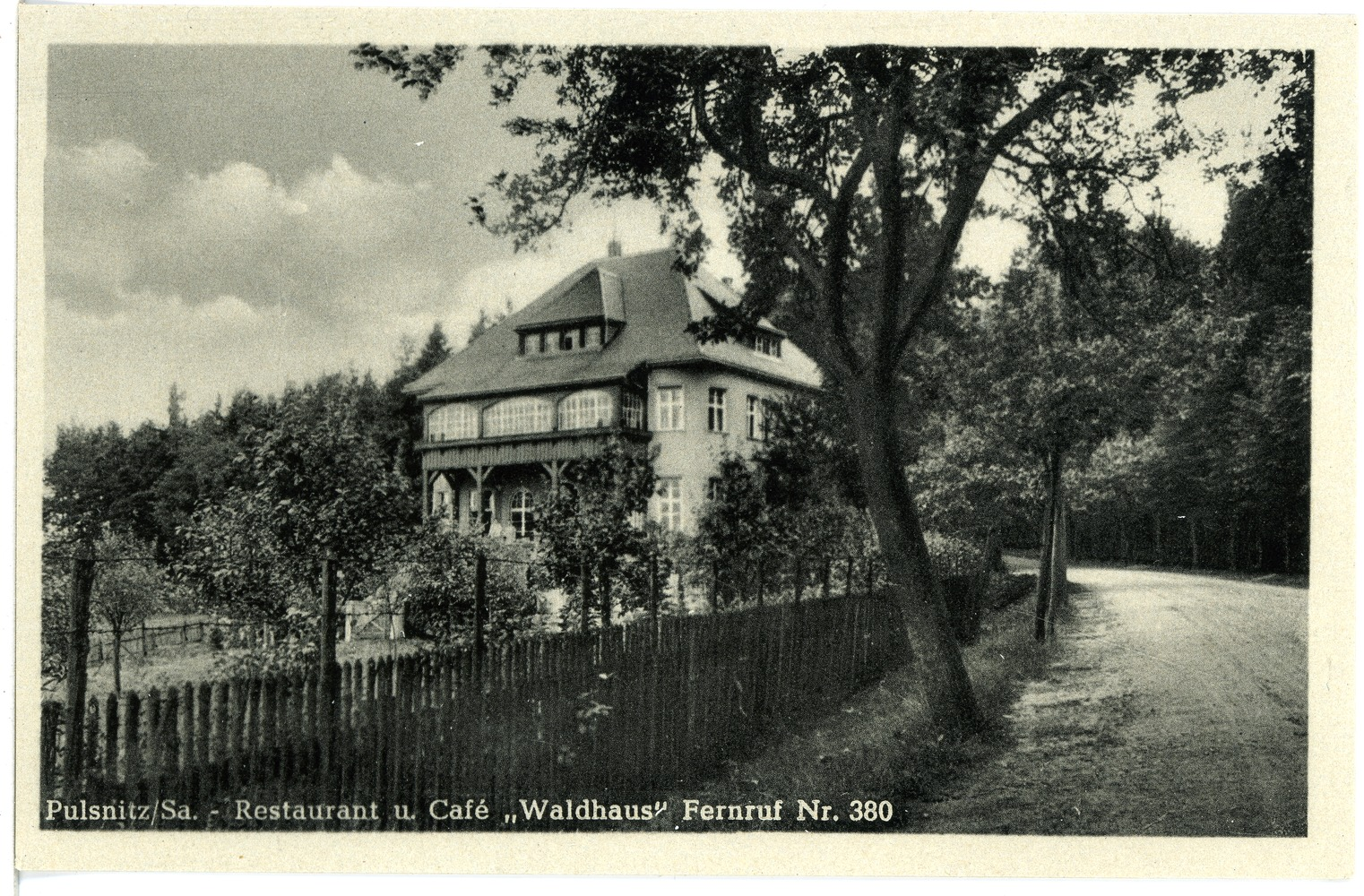 Pulsnitz; Restaurant und Cafe Waldhaus This postcard is from publisher Brück & Sohn in Meißen ( postcard has a unique number 28322 and is available in a higher resolution at the publisher. This images was uploaded in a cooperation project between Wikipedians and the publisher.